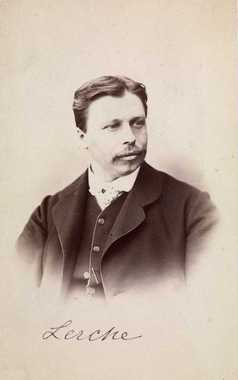 Vincent Stoltenberg Lerche. Eier Oslo museum